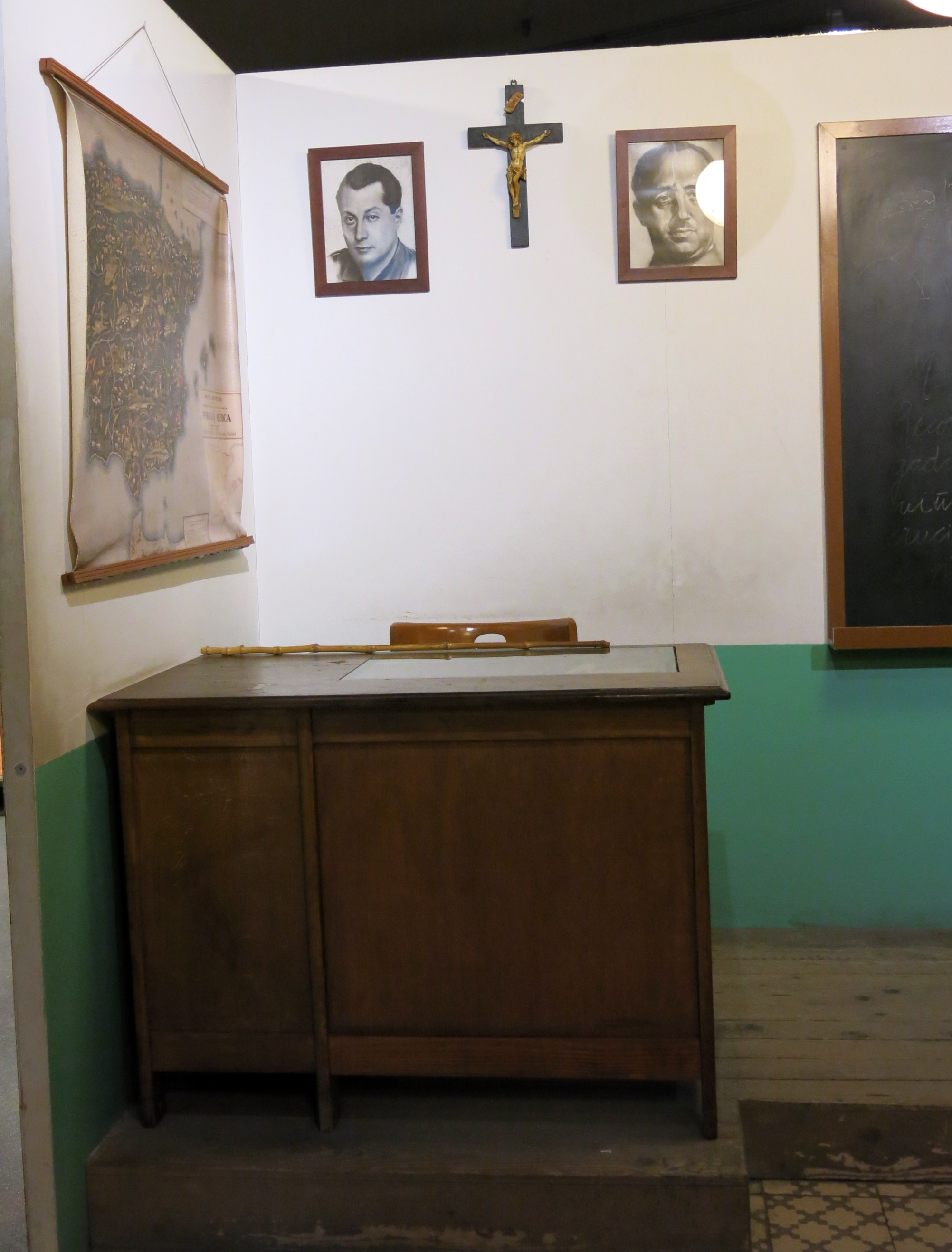 Magatzems generals del Dipòsit (Barcelona). Inclouen el Museu d'Història de Catalunya